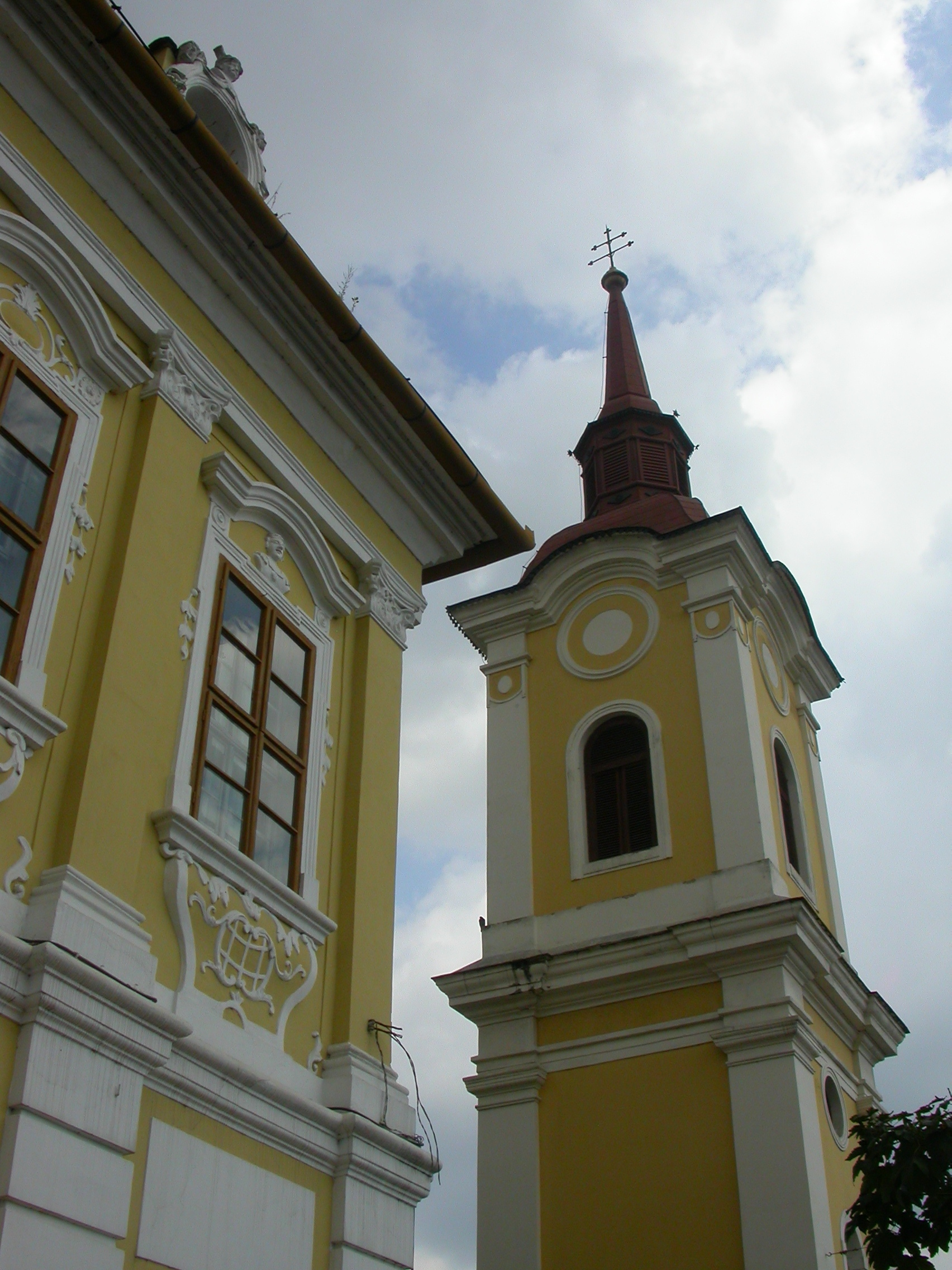 Turnul-clopotniță al fostei mănăstiri franciscane, 1820